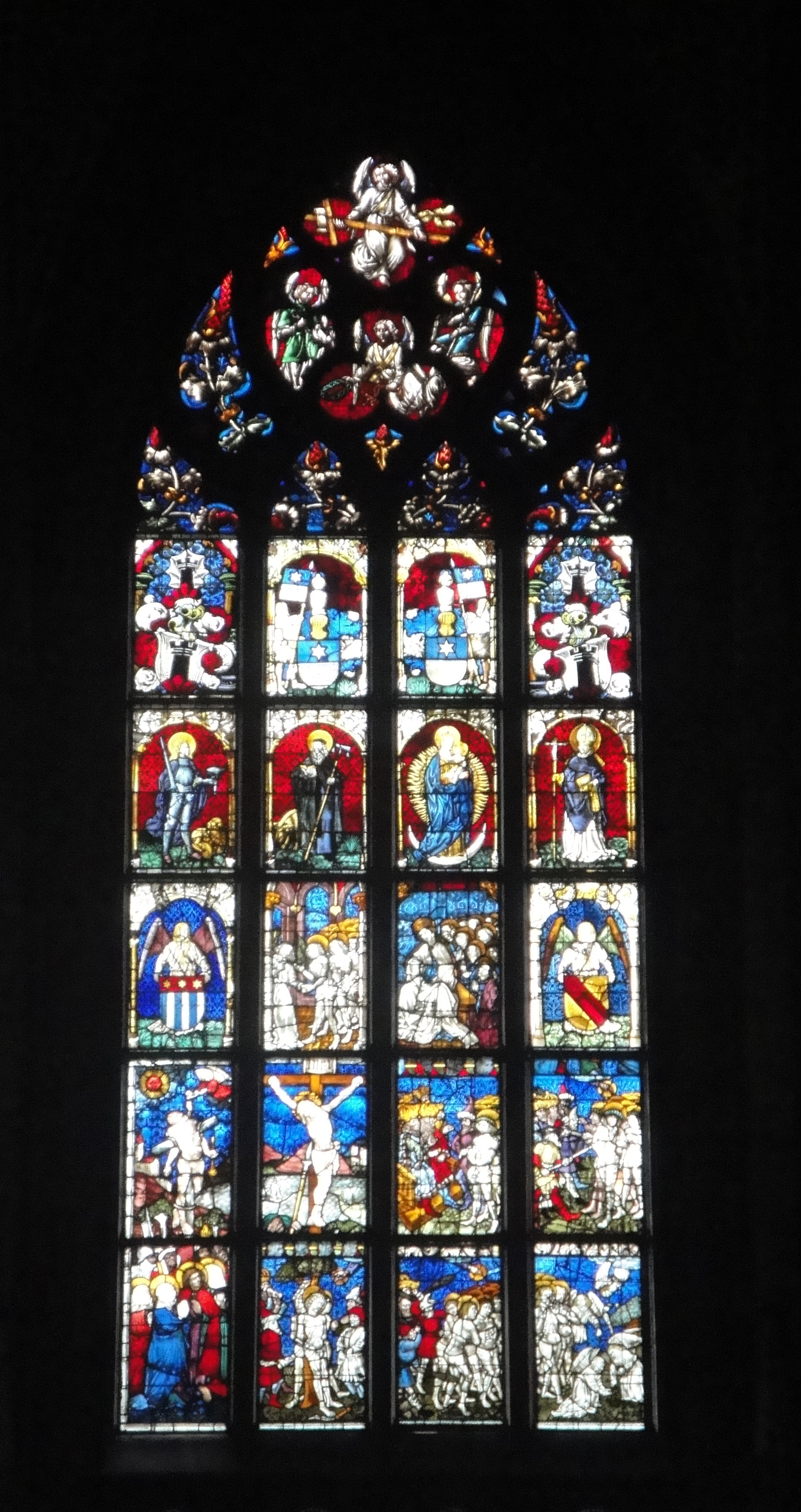 Bern, Münster (Fenster Südseite)